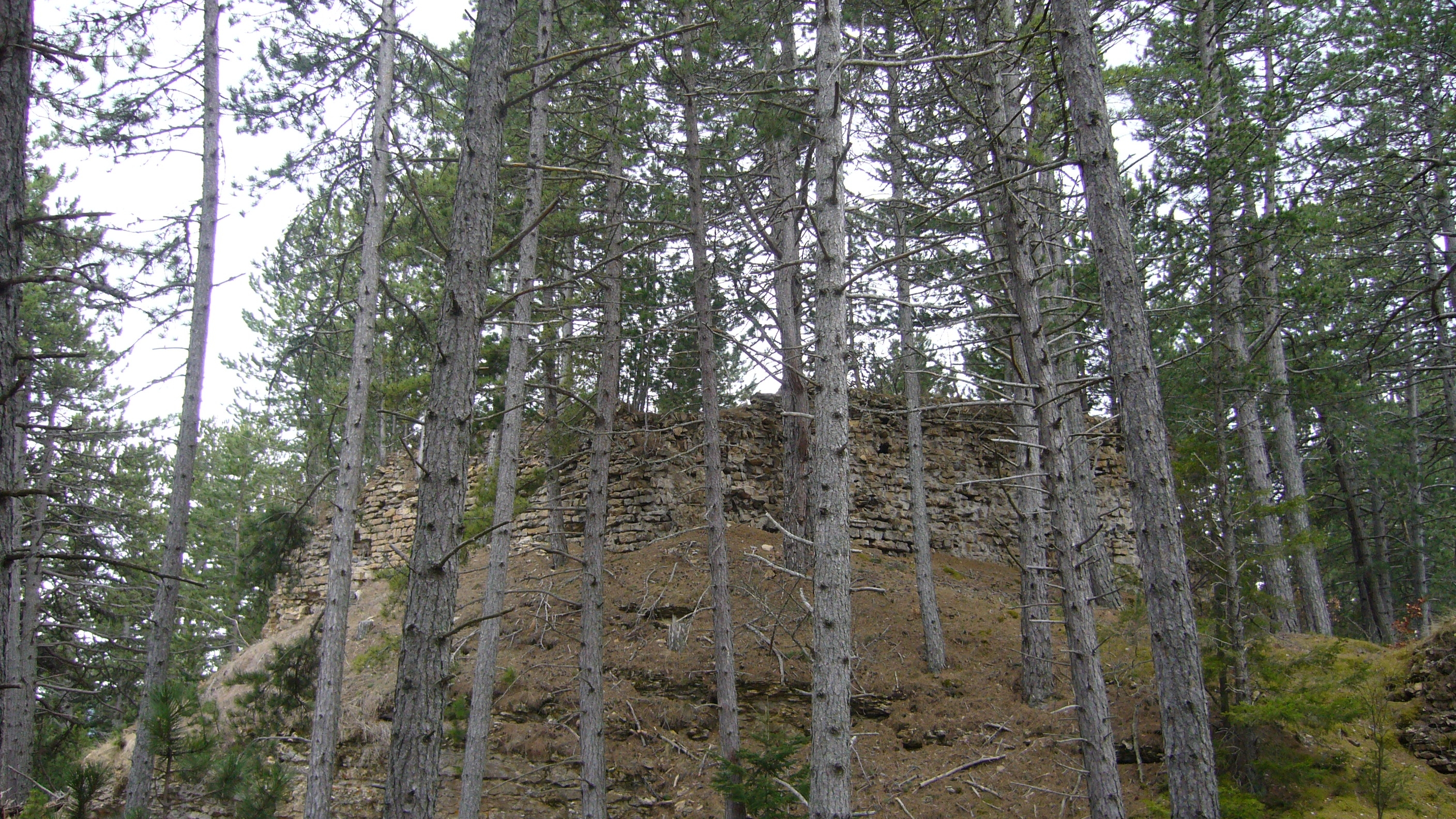 Le château de Chapieu, sur le Mont Mimat entre Mende et Lanuéjols, Lozère, France